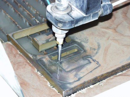 Obdelava z abrazivnim vodnim curkom.